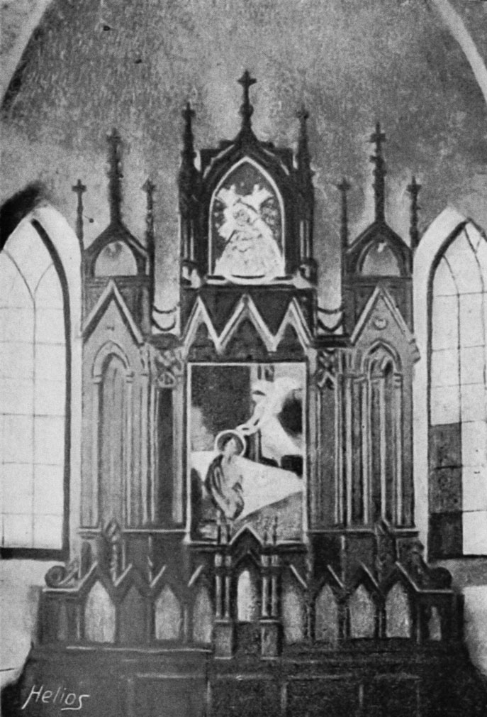 Беларуская (тарашкевіца): Івянец (Ivianiec), вуліца Ракаўская (vulica Rakaŭskaja). Касьцёл Сьвятога Аляксея, інтэр'ер